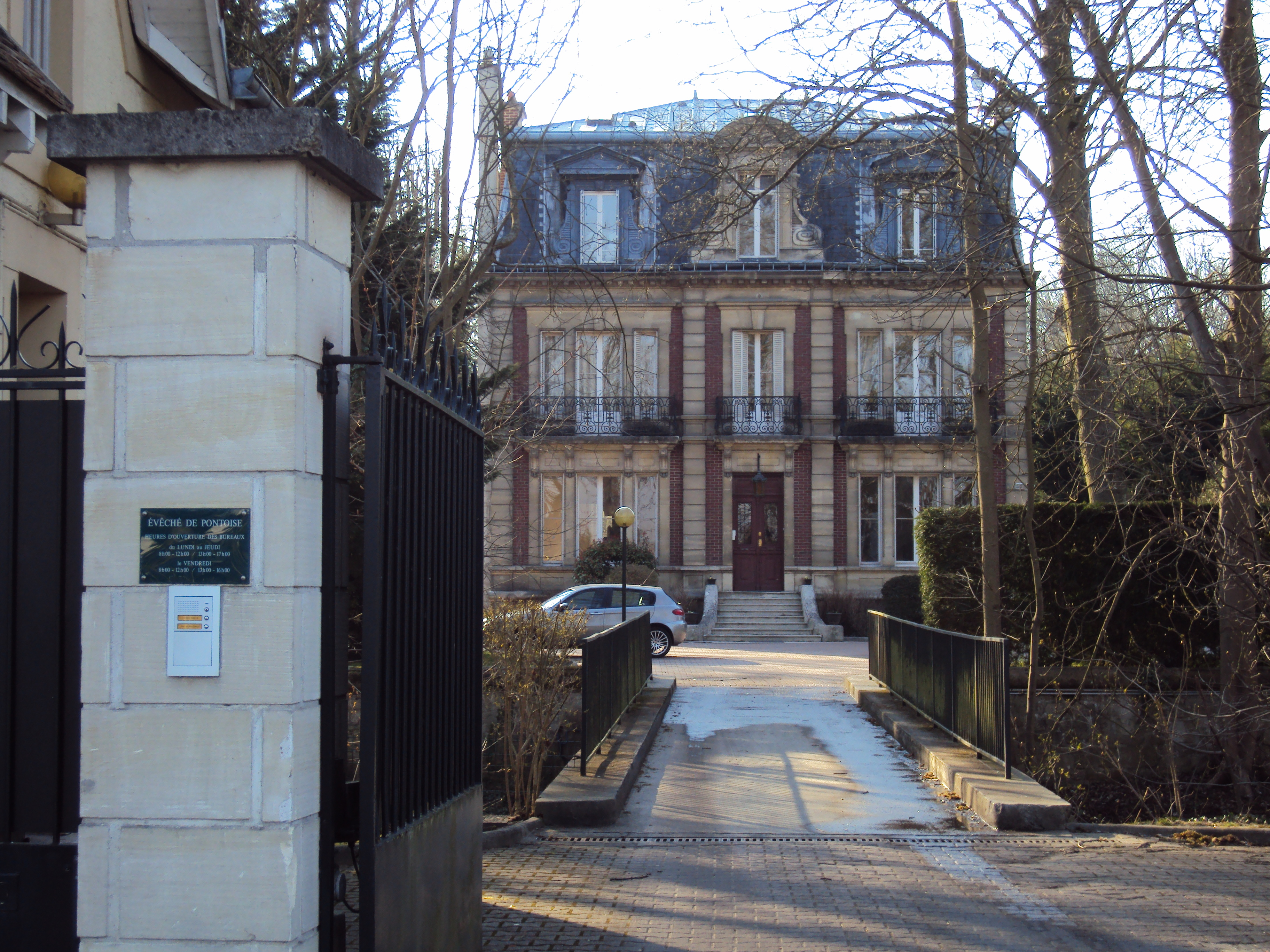 Bâtiment de l'évêcher de Pontoise